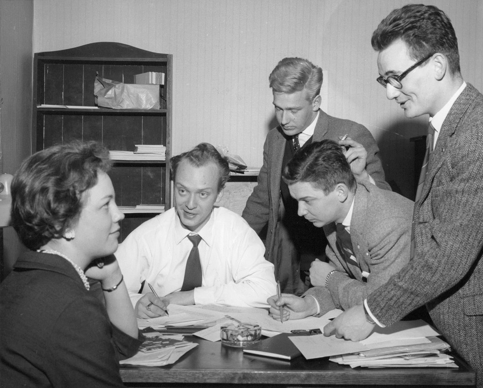 Marie-Louise Hammarstrand, distriktsordföranden Birger Hagård, ombudsman Torsten Swenzén, Ulf Söderberg och Ulf Swenzén tar emot rapporter om nya unghögermedlemmar.473 nya betalande unghögermedlemmar blev resultatet av "Operation Måndag" bland 30 föreningar i Stockholms län. Kampanjen arrangerades på måndagskvällen i distriktets regi. Efter kl. 21 ringde föreningarna in sitt resultat och det bästa resultatet presenterades av konservativa skolungdomsföreningen på Lidingö, som hade skaffat hela 79 nya medlemmar. Näst bäst förening var Djursholm, som skaffade 55 nya medlemmar och därefter kom Stocksund med 52. Med detta har Stockholmsdistriktet av högerns ungdomsförbund passerat 2,000-strecket med god marginal.